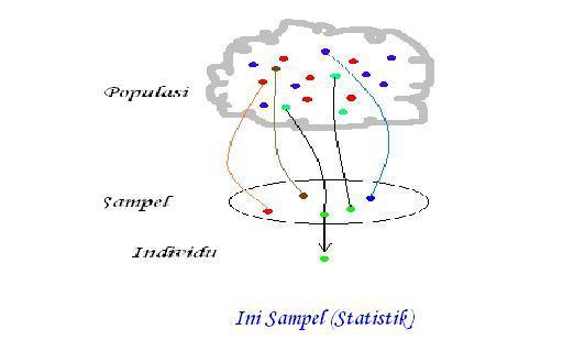 penjelasan (gambar) pengambilan sampel pada statistik.